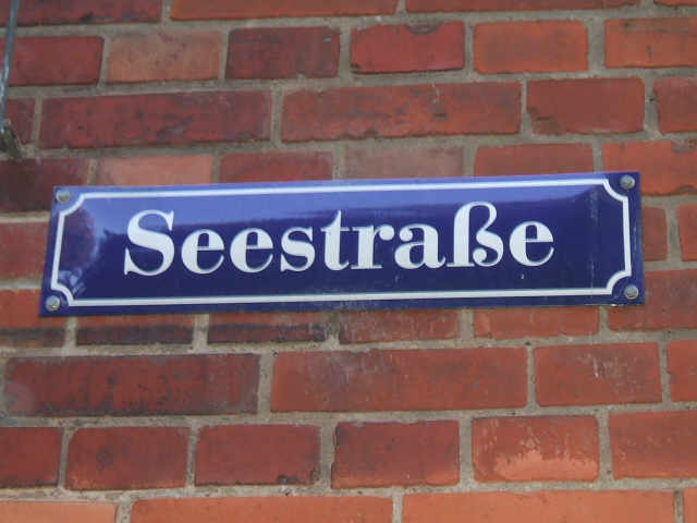 Stralsund, Germany, Straßenschild